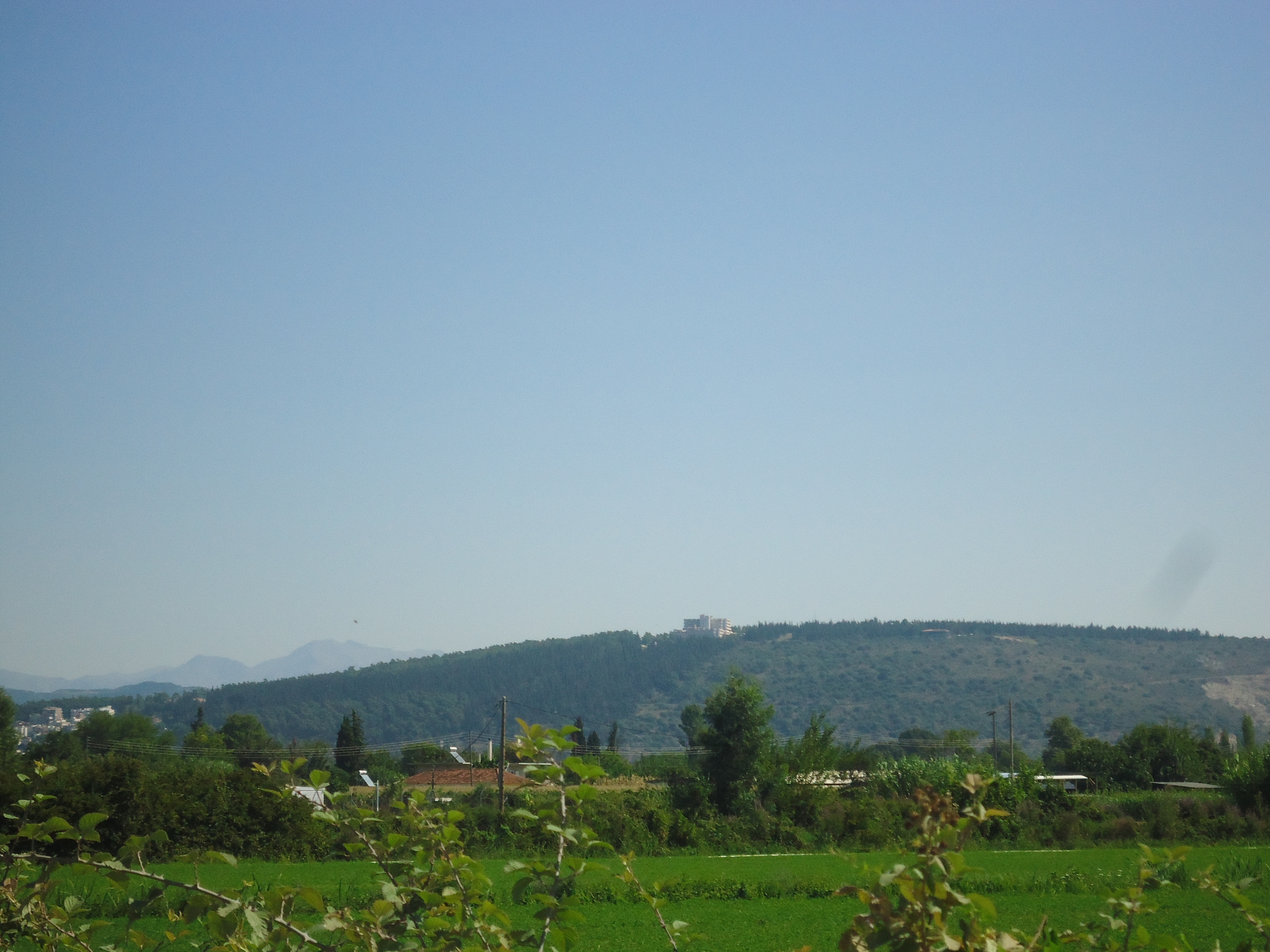 Ο λόφος Περάνθης και το Γενικό Νοσοκομείο Άρτας.